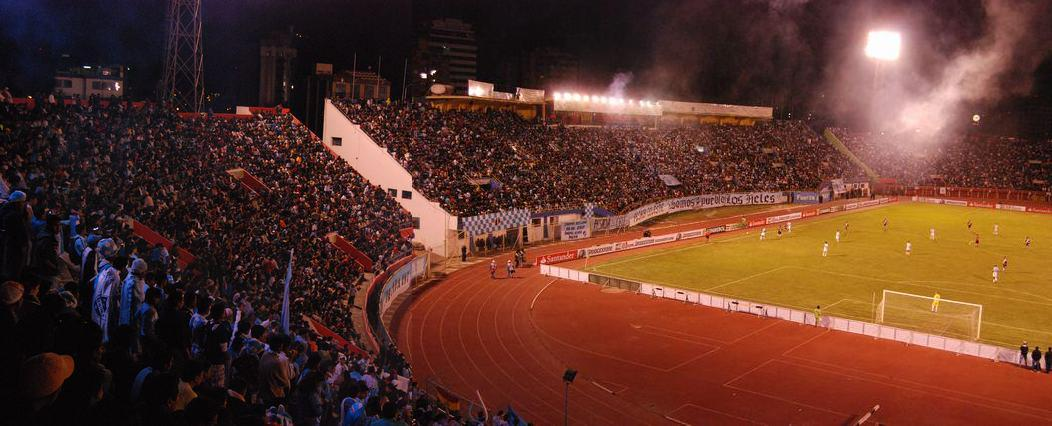 Hinchada del Club Aurora en la Copa Sudamericana 2011 en el Estadio Félix Capriles donde se observa un lleno completo.